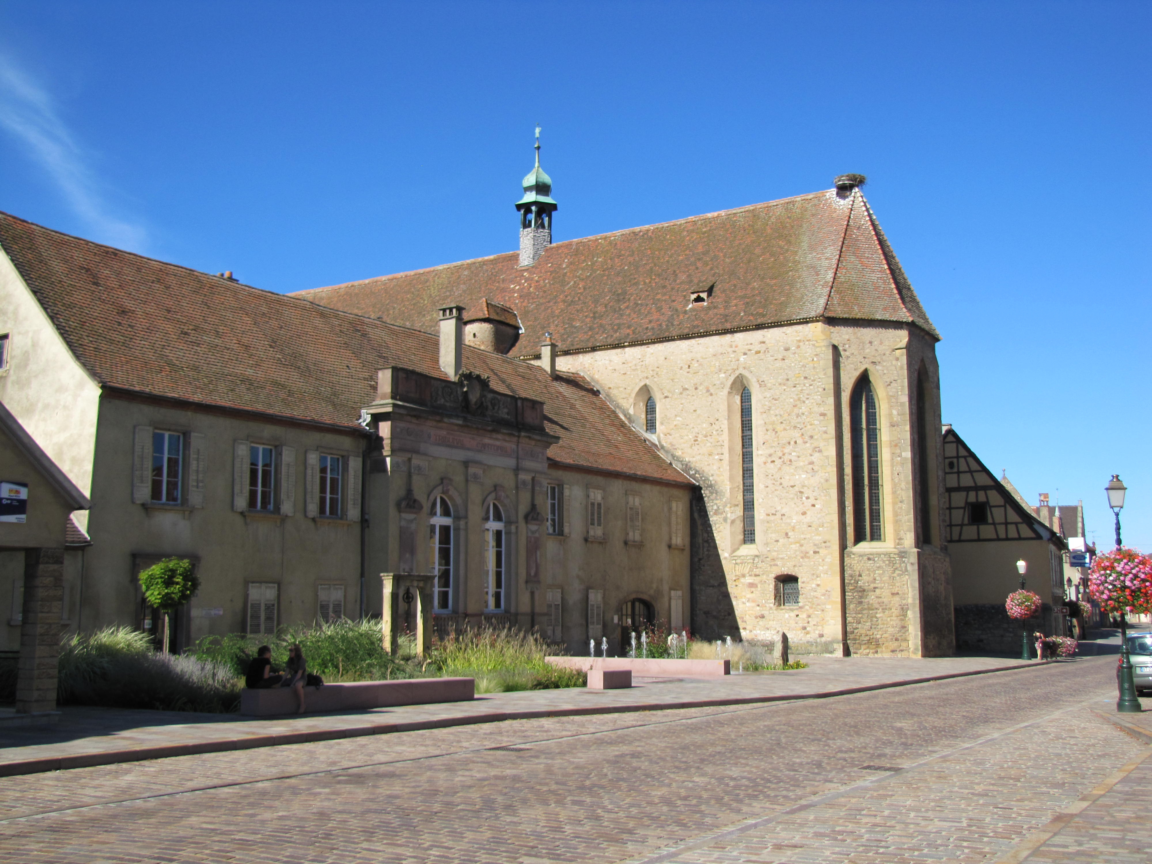 Alsace, Haut-Rhin, Rouffach, Ancien Couvent de franciscains, des Récollets (XVIIe-XVIIIe), puis tribunal (XIXe), Chapelle Sainte-Catherine d'Alexandrie (XIVe-XVIIIe), rue du Quatrième-Régiment-des-Spahis-Marocains. It is indexed in the Base Mérimée, a database of architectural heritage maintained by the French Ministry of Culture, under the references PA00085768, PA00085637 and IA68004433.